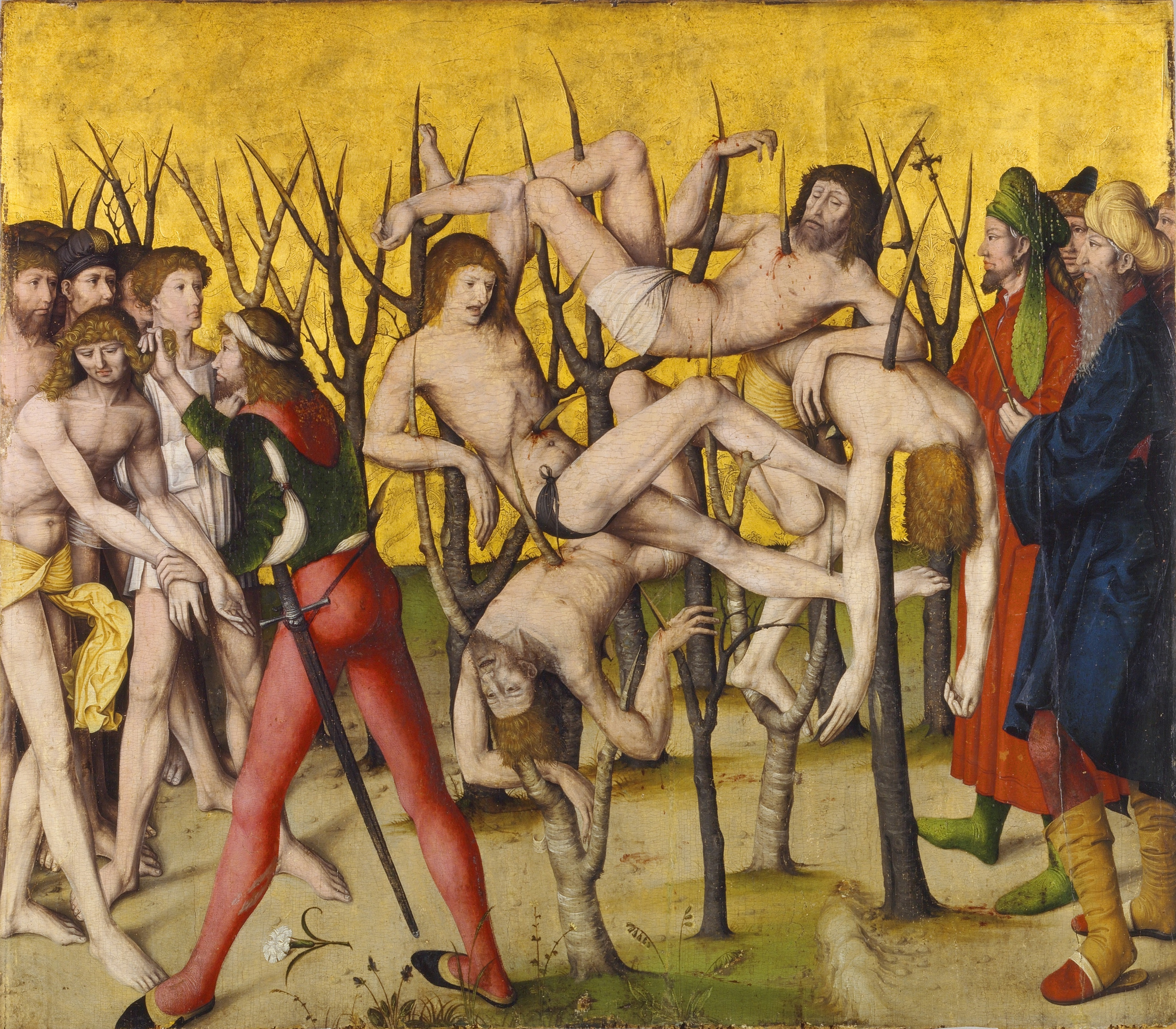 Altartafel "Martyrium der 10.000 Ritter". In der Mitte die aufgespiessten nackten römischen Legionäre.